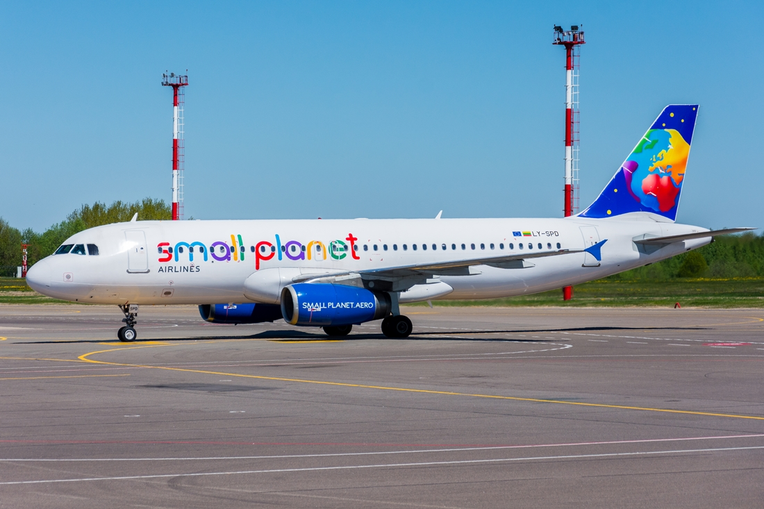 Airbus A320 (reg. LY-SPD) Vilniaus oro uoste.